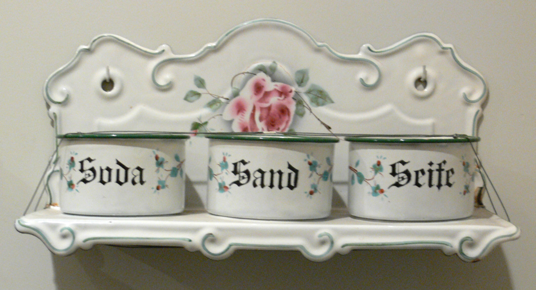 Halter für Soda, Sand und Seife, emailliertes Eisenblech 1. Hälfte 20. Jh.Landesmuseum Württemberg (Außenstelle Museum für Volkskultur in Württemberg, Waldenbuch); E.7.2., Inv. Nr. 1988/577